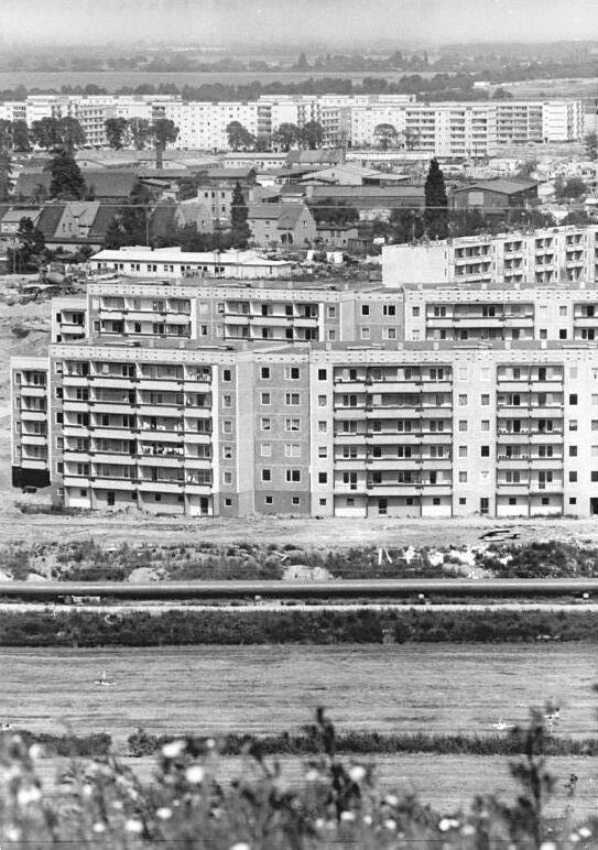 ADN-ZB-Zimmermann-25.6.86-Berlin-Bauplatz Berlin: Dörfliches und Städtisches ist in Berlins jüngstem Stadtbezirk Hellersdorf eng zusammengerückt. Rund um den Hellersdorfer Ortskern errichten Bauleute aus allen Bezirken der DDR bis 1990 jährlich acht- bis zehntausend Neubauwohnungen mit den dazugehörigen gesellschaftlichen Einrichtungen.